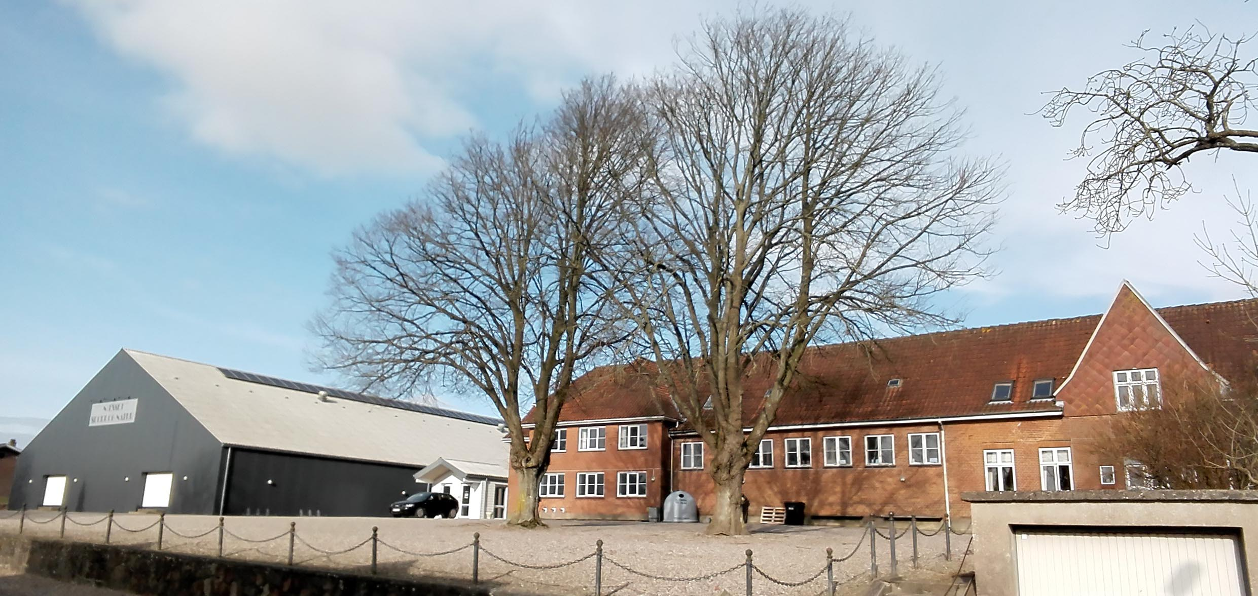 Næshallen i Kelstrup